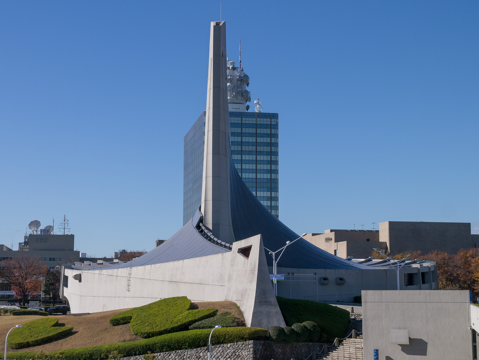 国立代々木競技場第二体育館。